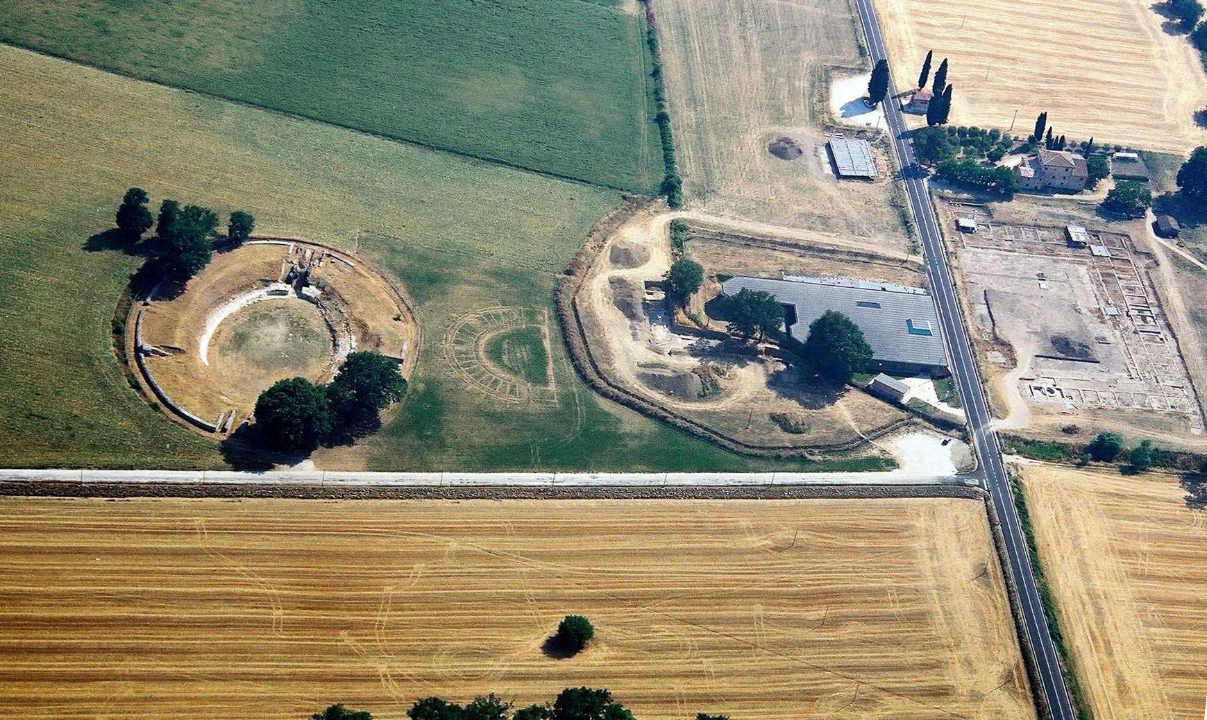 Anfiteatro dell'Area Archeologica della città romana di Suasa - MIBAC This is a photo of a monument which is part of cultural heritage of Italy.